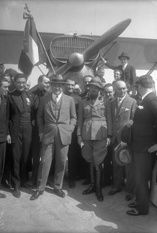 Eine italienische Flugzeugstaffel fliegt über den Ozean nach Brasilien! Den ersten Massenflug über den Ozean unternimmt eine italienische Staffel von 12 Flugzeugen, die unter dem Kommando des italienischen Generals und Luftfahrtsministers Balbo stehen. Der Flug geht von der westlichen Küsten Italiens in Etappen nach Brasilien. Der italienische Diktator Mussolini ist der Protektor dieses Unternehmens. Der italienische General und Luftfahrtsminister Balbo, welcher in dem Geschwaderflug das Kommando hat. Information added by Wikimedia users.*